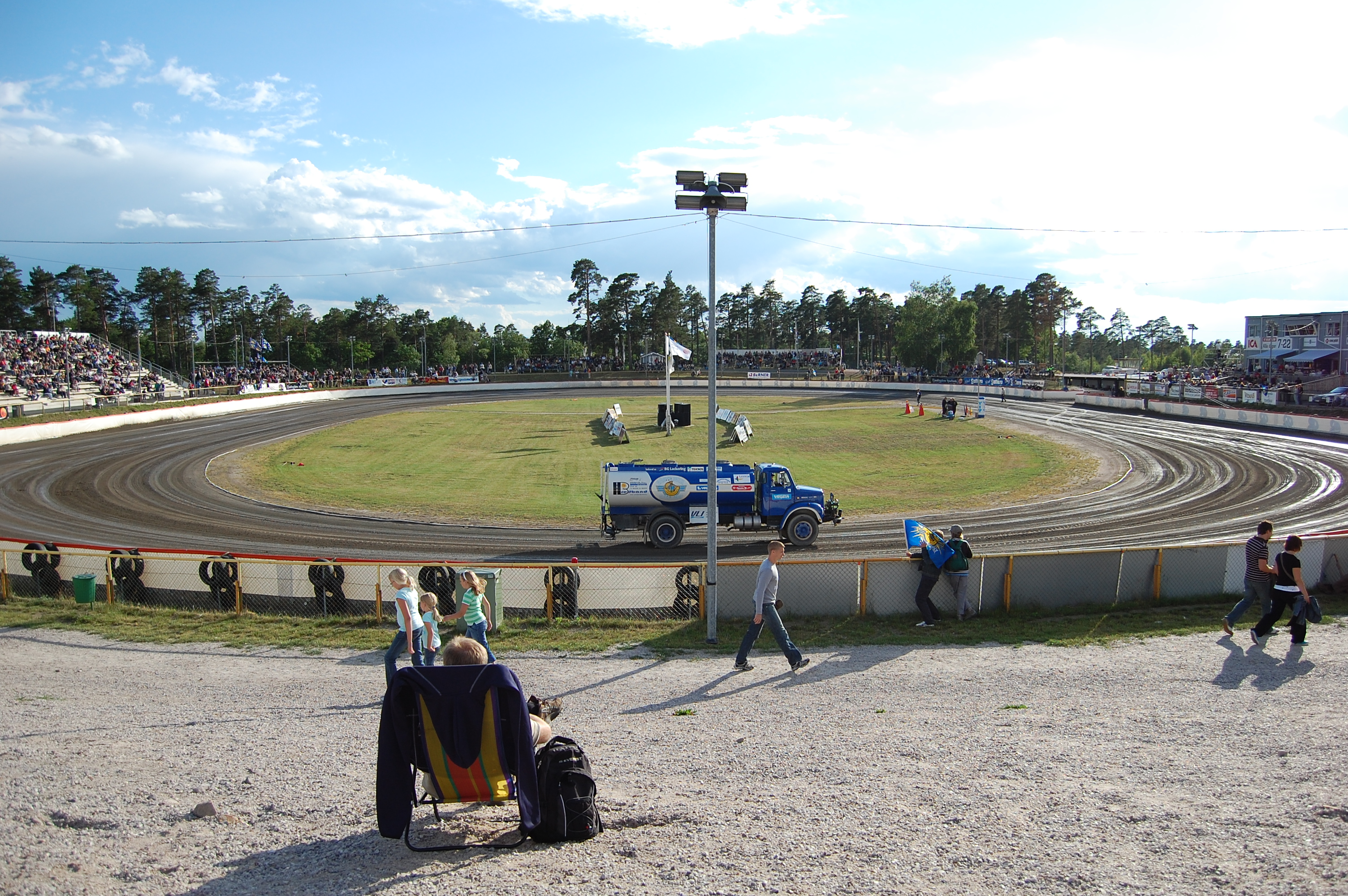 Västervik Speedway home arena.